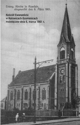 Reprodukcja pocztówki wydanej prawdopodobnie w roku 1905